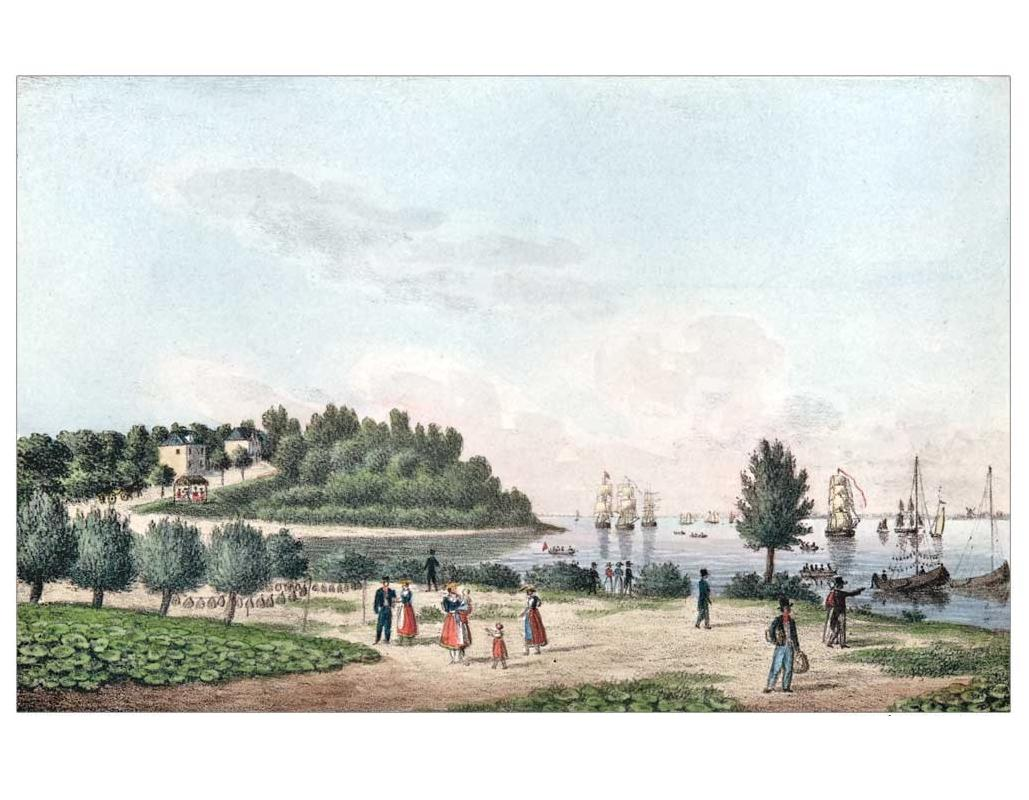 Hamburg, Elbchaussee die Brücke der Elbchaussee führt bei Teufelsbrück über die Flottbek